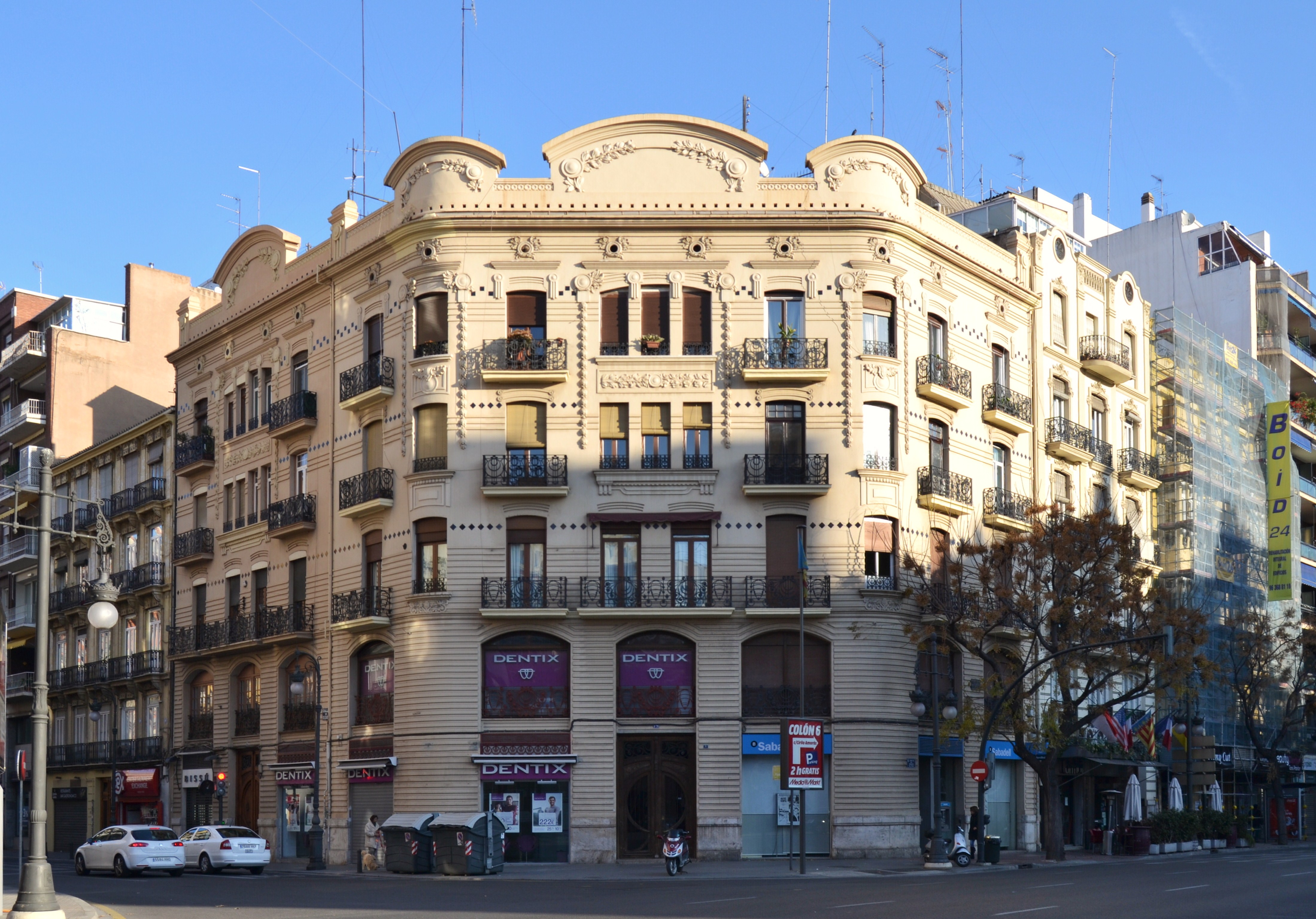 Edifici Francisco Sancho, València.